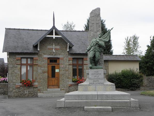 Mairie de la Selle en Coglès (35)